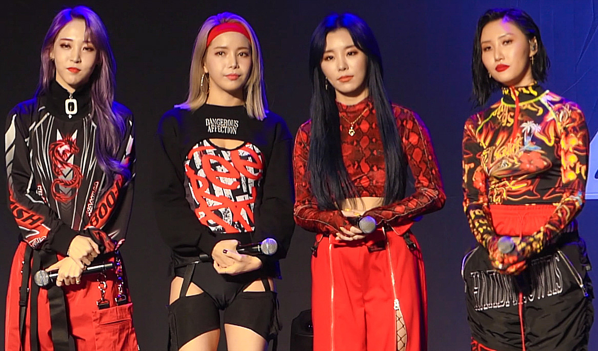 14일 오후 서울시 동대문구 회기동 경희대학교 평화의전당에서 걸그룹 마마무(MAMAMOO)의 두 번째 정규앨범 'reality in BLACK' 발매 기념 컴백 쇼케이스가 열려 기자 질의 응답시간을 갖고 있다. 한편 3년 9개월만에 발표하는 두 번째 정규앨범 'reality in BLACK'으로 한층 확장된 음악 세계를 그려내며 마마무(화사,문별,솔라,휘인) 만의 독보적인 아이덴티티를 선보일 예정으로 댄스, 발라드, R&B, 재즈 힙합, 트로피컬 하우스 등 다양한 장르를 아우르는 완성도 높은 노래 총 11곡을 수록했다.